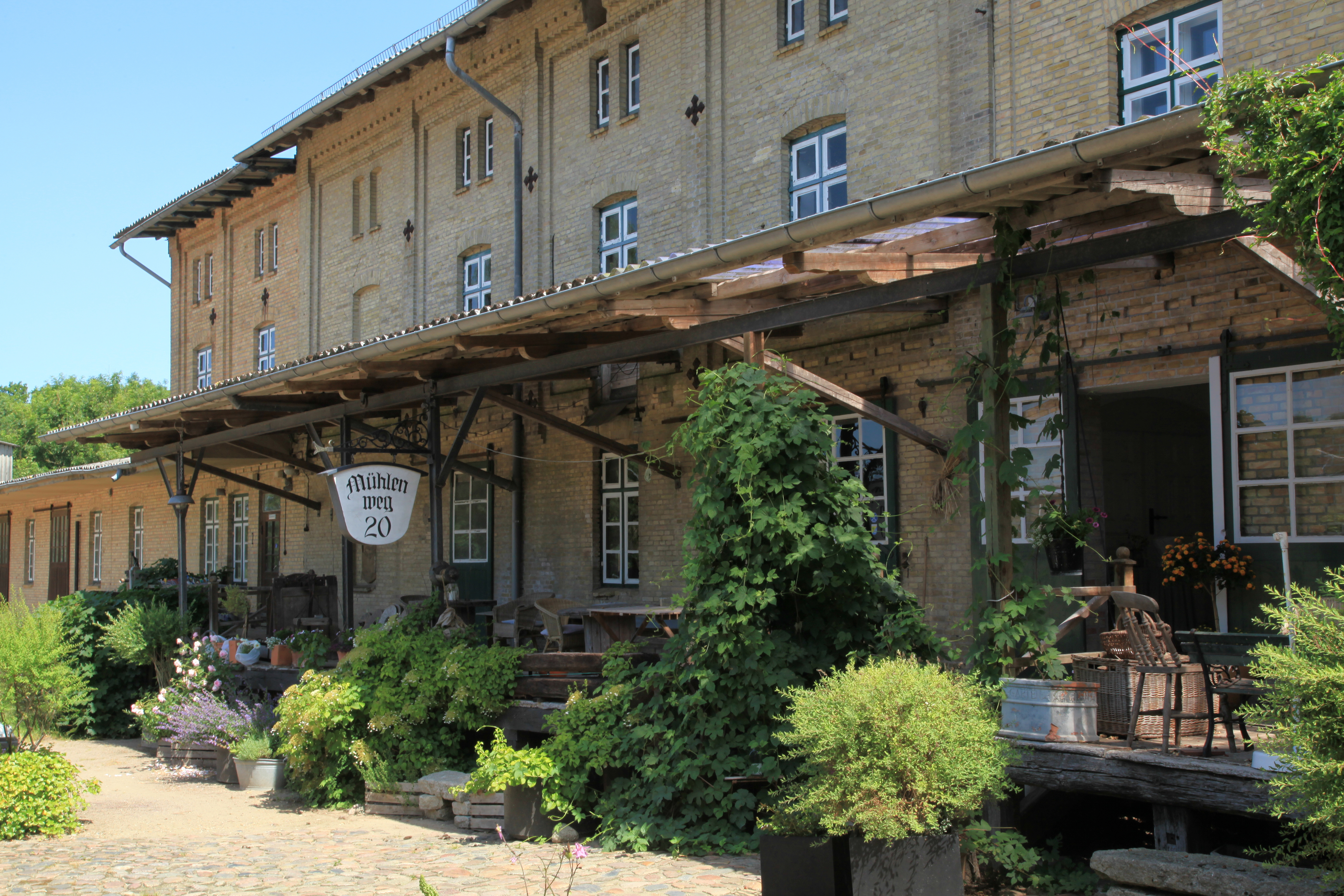 Selker Mühle, Mühlenweg in [Selk